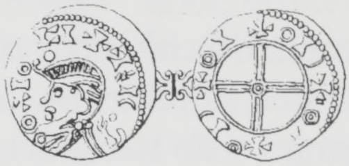 Halb-Pfennig von Magnus III Berrføtt, 1093-1103 König von Norwegen. Kein sinnvoler Text. 0,399 g. Feinghalt 875 ‰.